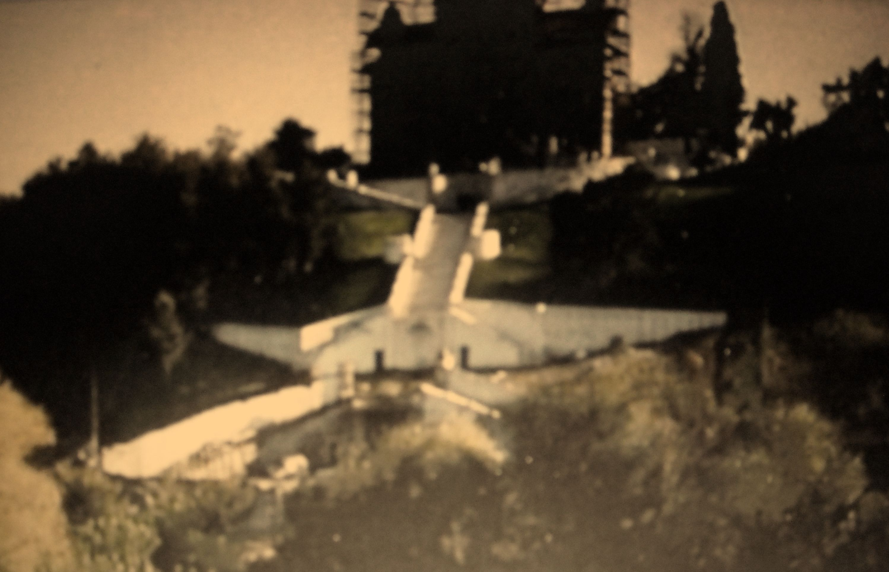 Villa del duca di york